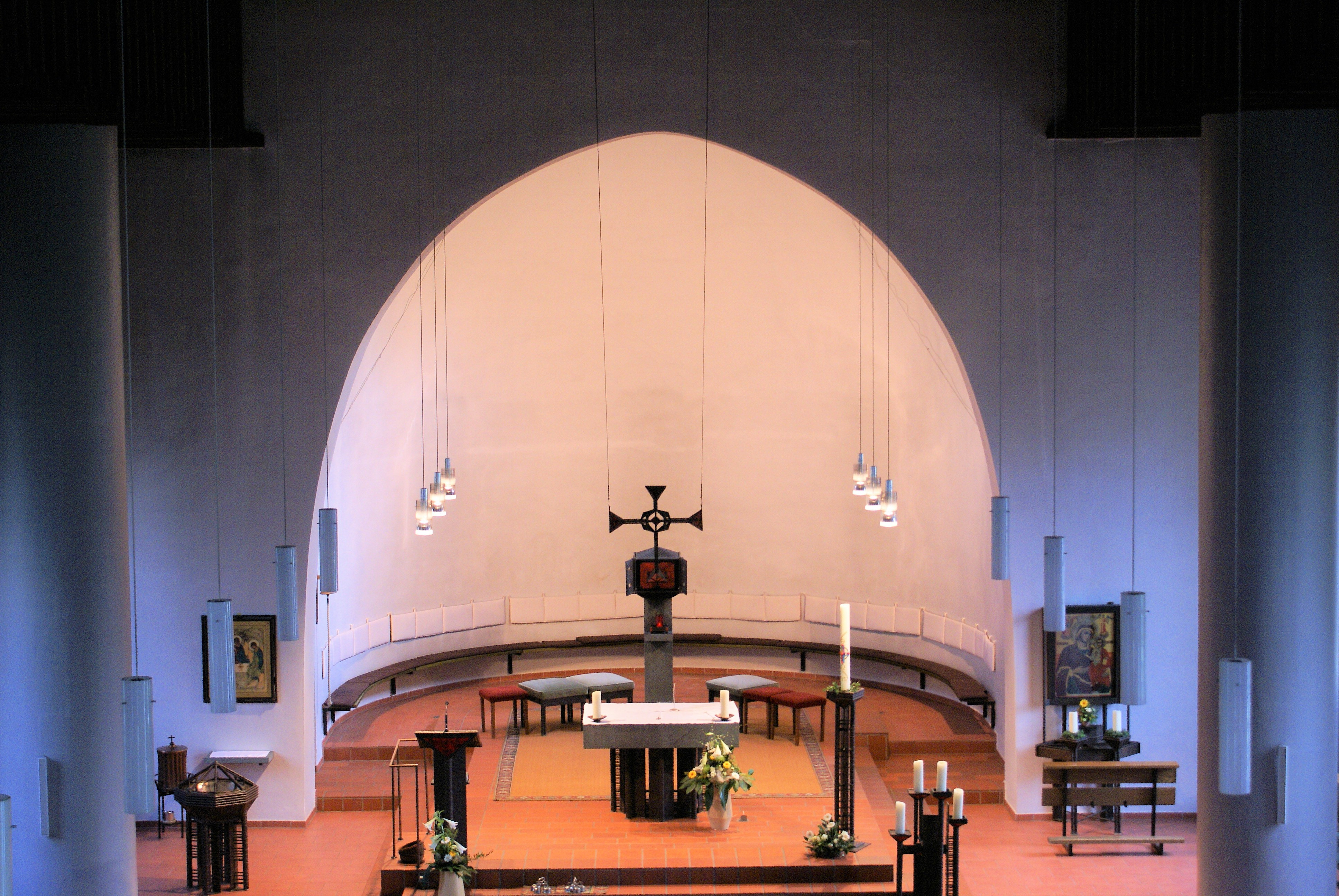 St. Marien in Dorsten-Hervest, Landkreis Recklinghausen, Nordrhein-Westfalen, Deutschland